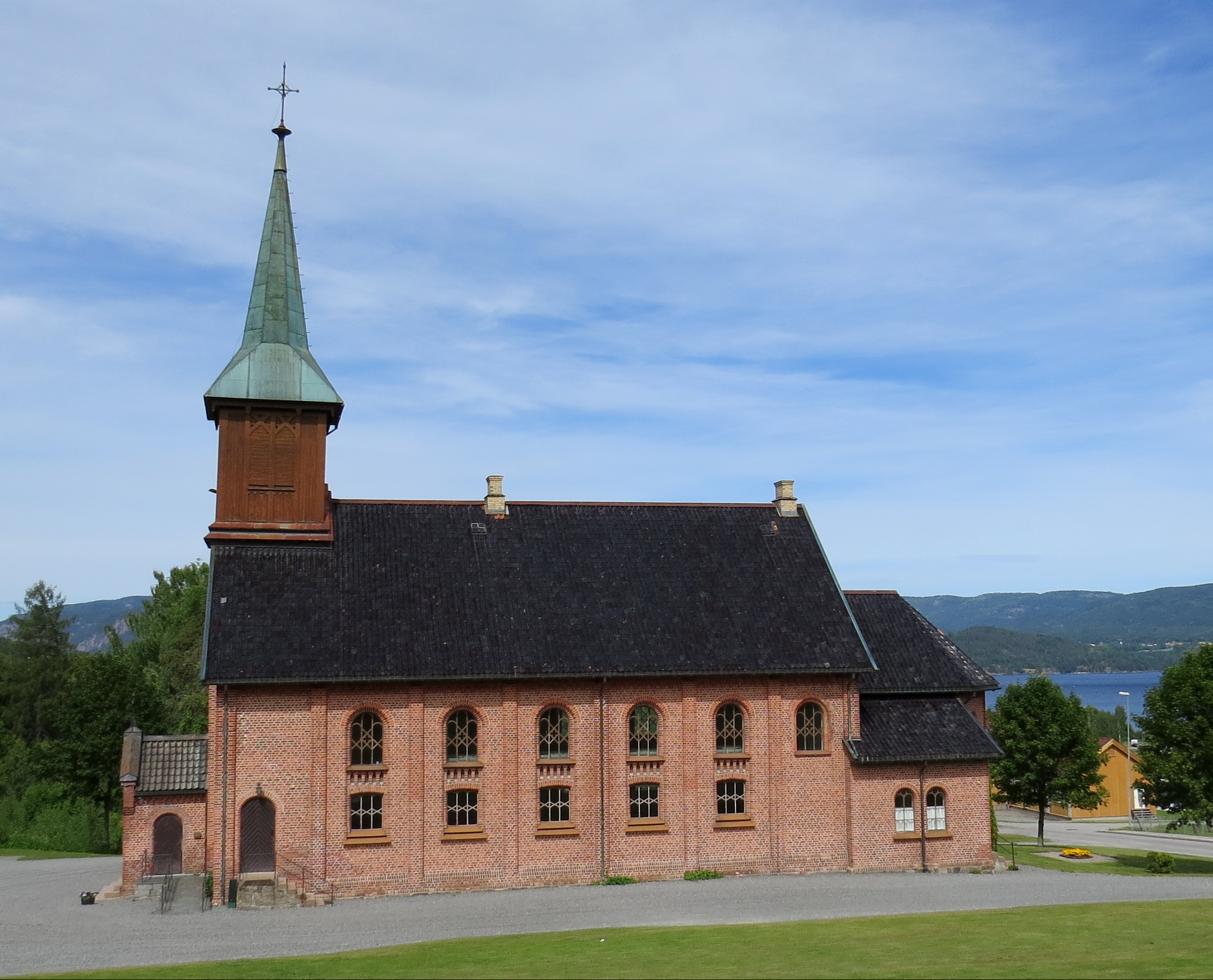 Holla nye kirke ved Ulefoss